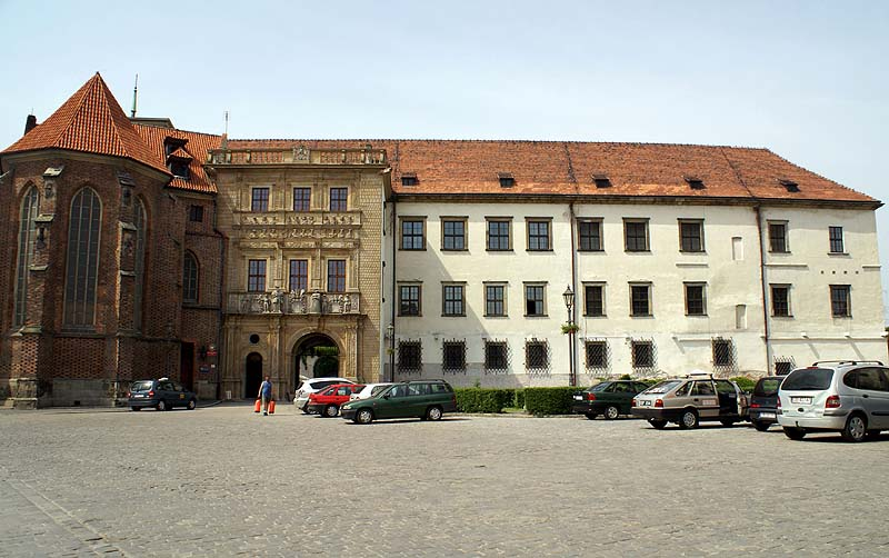 Brzeg, zamek, 1547-1586